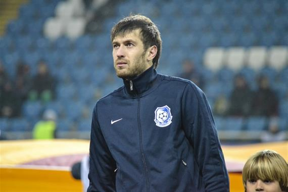 Дмитро Безотосний 30 листопада 2013 року перед матчем із загребським Динамо.